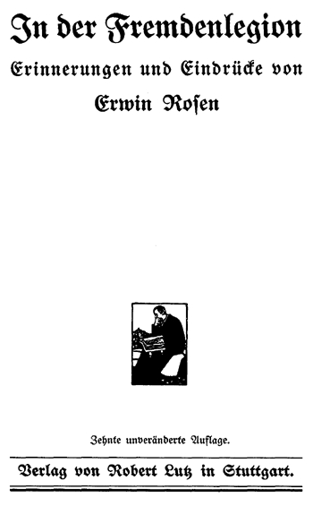 Titelblatt von Erwin Rosen: In der Fremdenlegion : Erinnerungen und Eindrücke. Stuttgart : Verlag Robert Lutz, 1909.